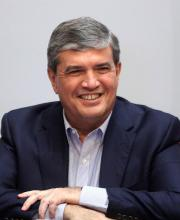 Manuel Florentino González Flores, gobernador interino del estado mexicano de Nuevo León desde el 1 de enero de 2018